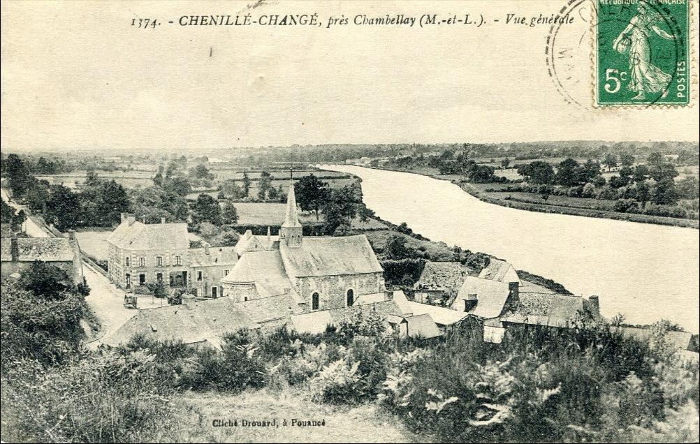 Vue général du bourg de Chenillé-Changé au début du XXe siècle.